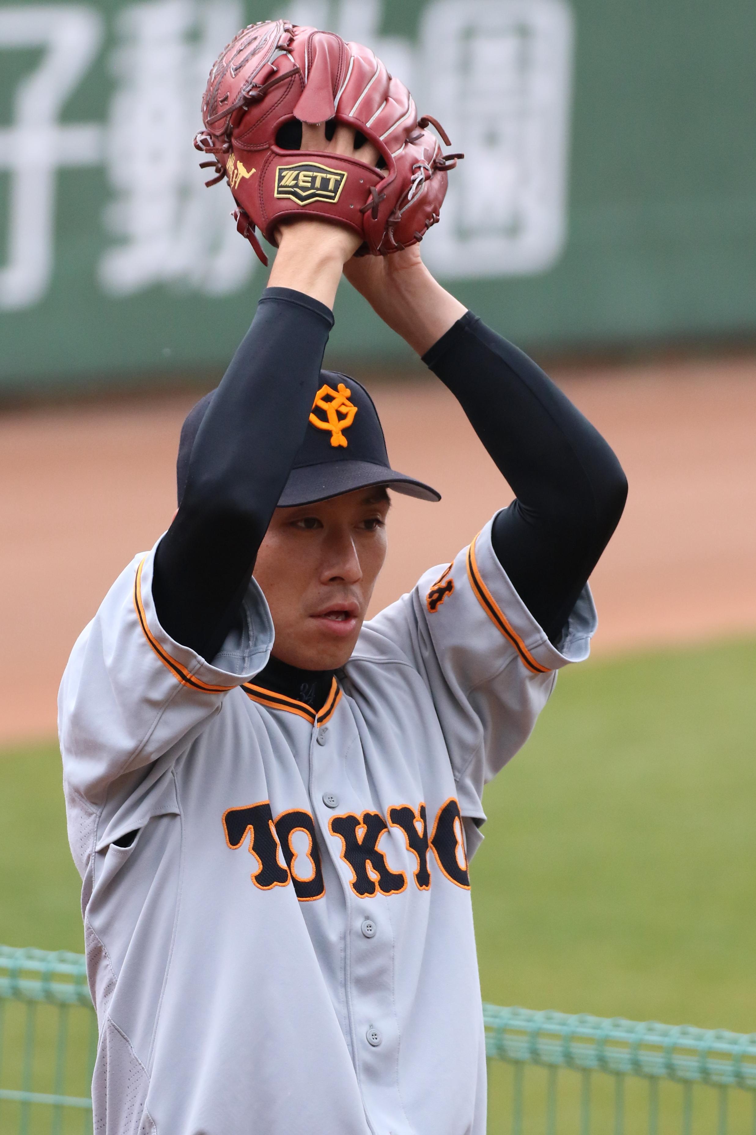 ジャイアンツ吉川選手